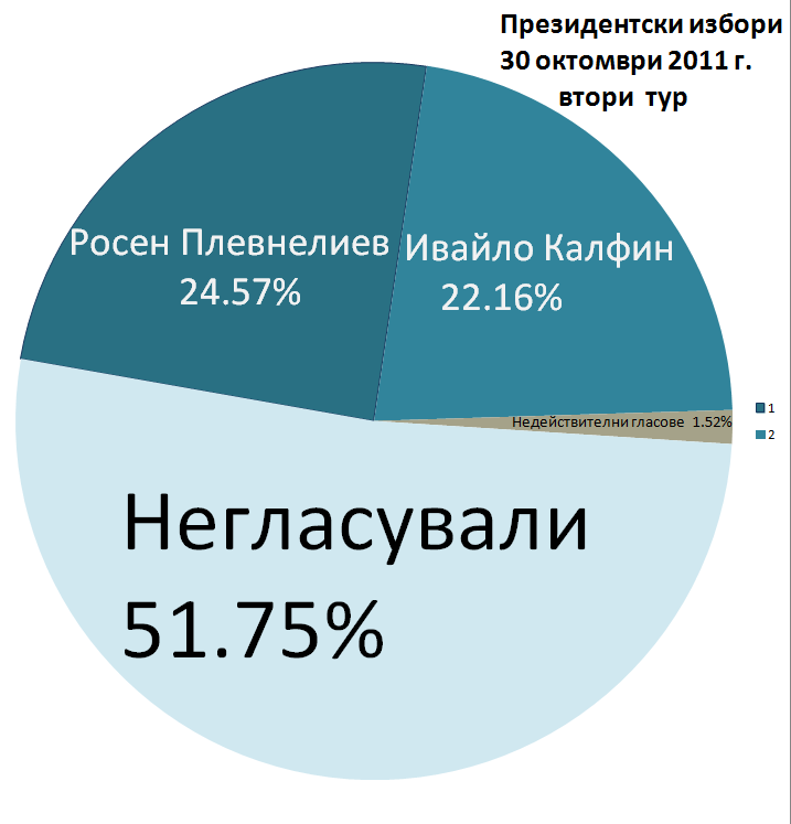 Президентски избори 30 октомври 2011 г. втори тур